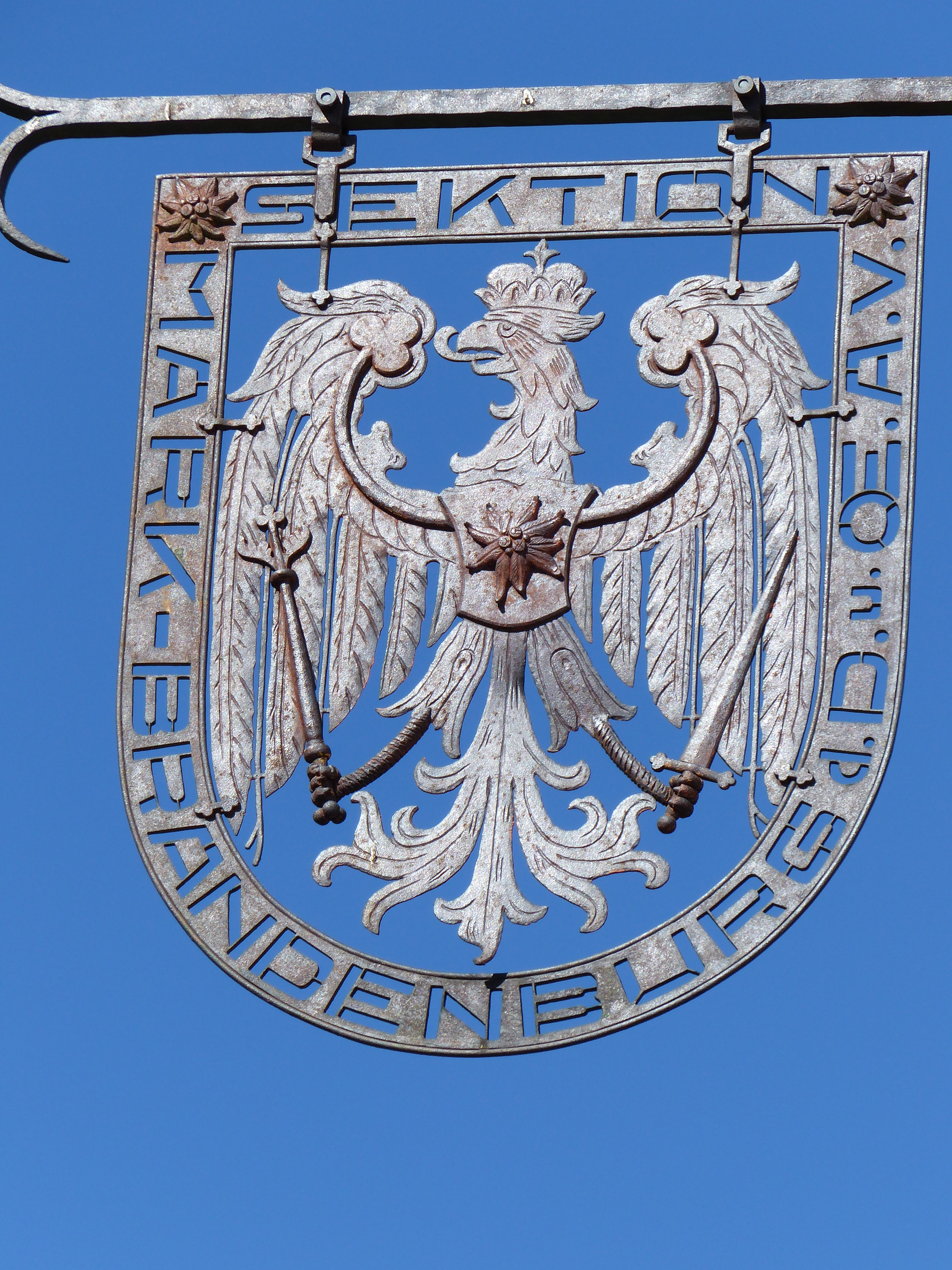 Nasenschild am Hochjochhospiz für die erbauende Sektion Sektion Mark-Brandenburg des DuOEAV